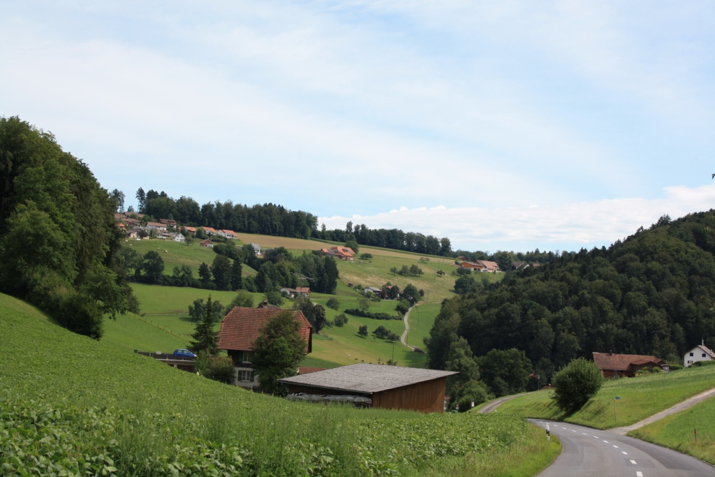 Reidermoos, Blick Richtung Wiliberg